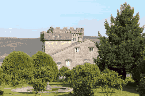 Vistas do castelo de Tebra.